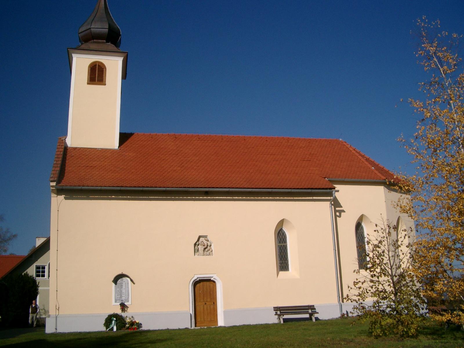 Kath. Filialkirche hl. Maximilian